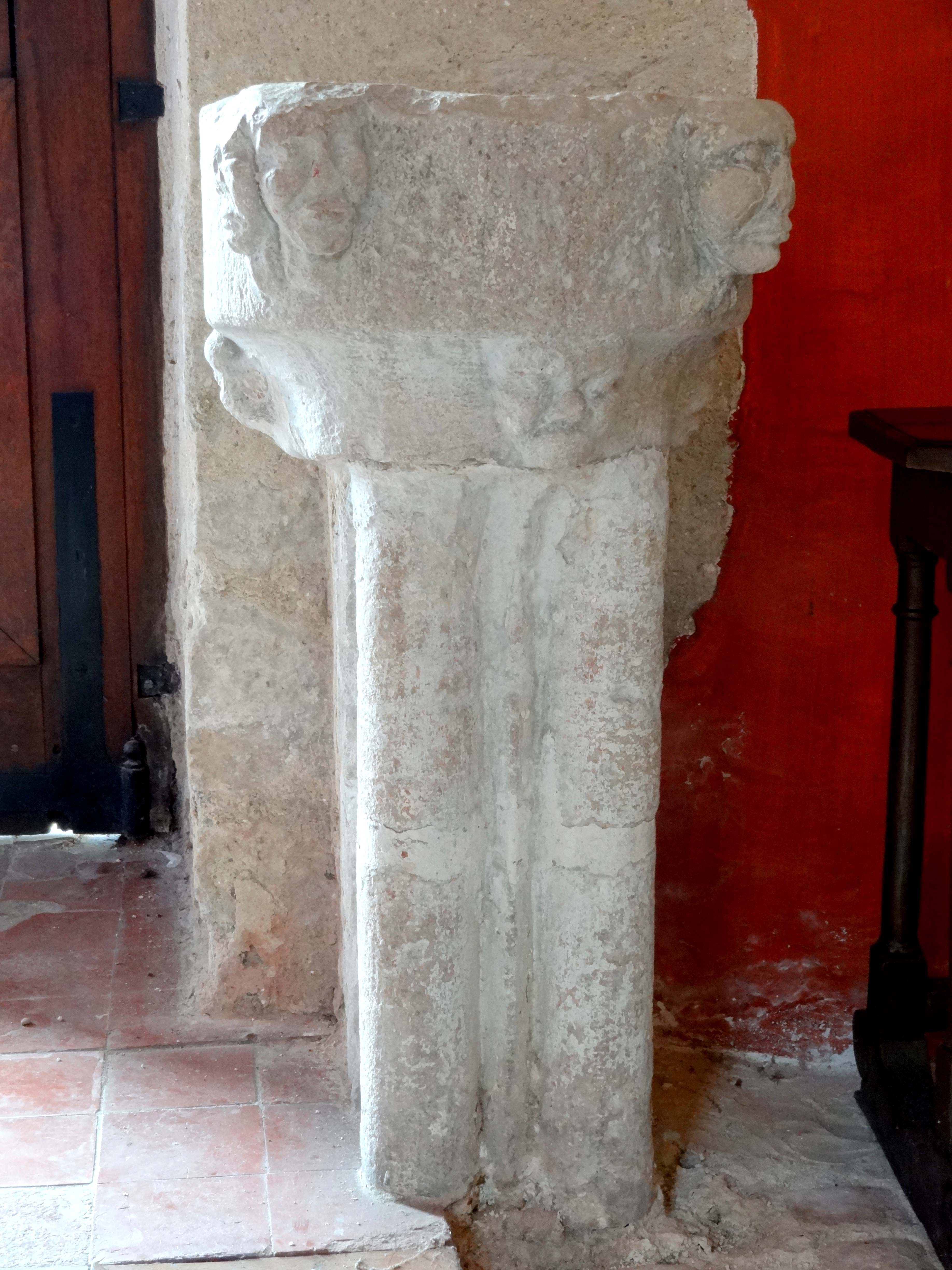 Mobilier de l'église - voir titre.